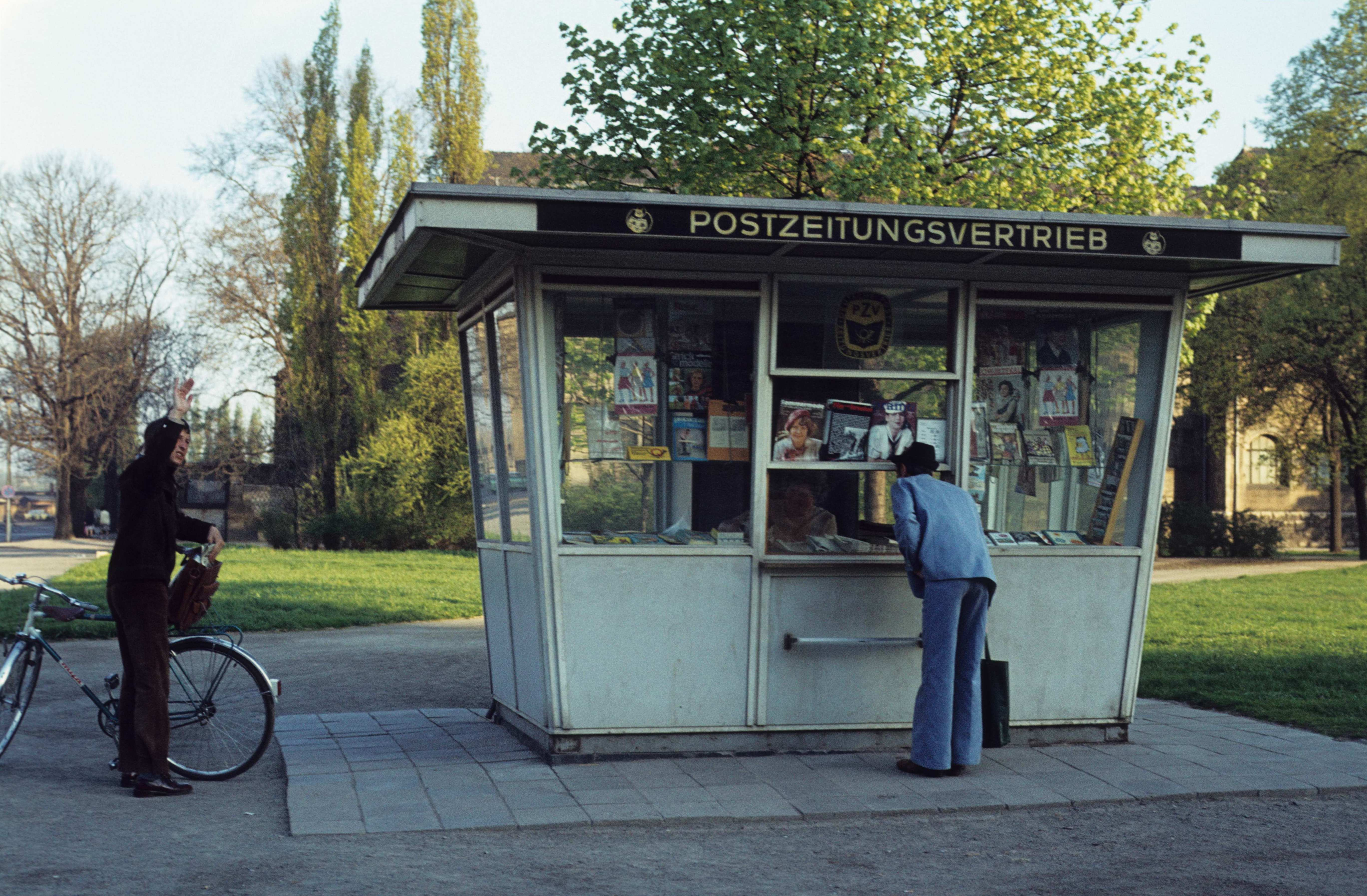 1980-05. Magdeburg, Deutsche Demokratische Republik